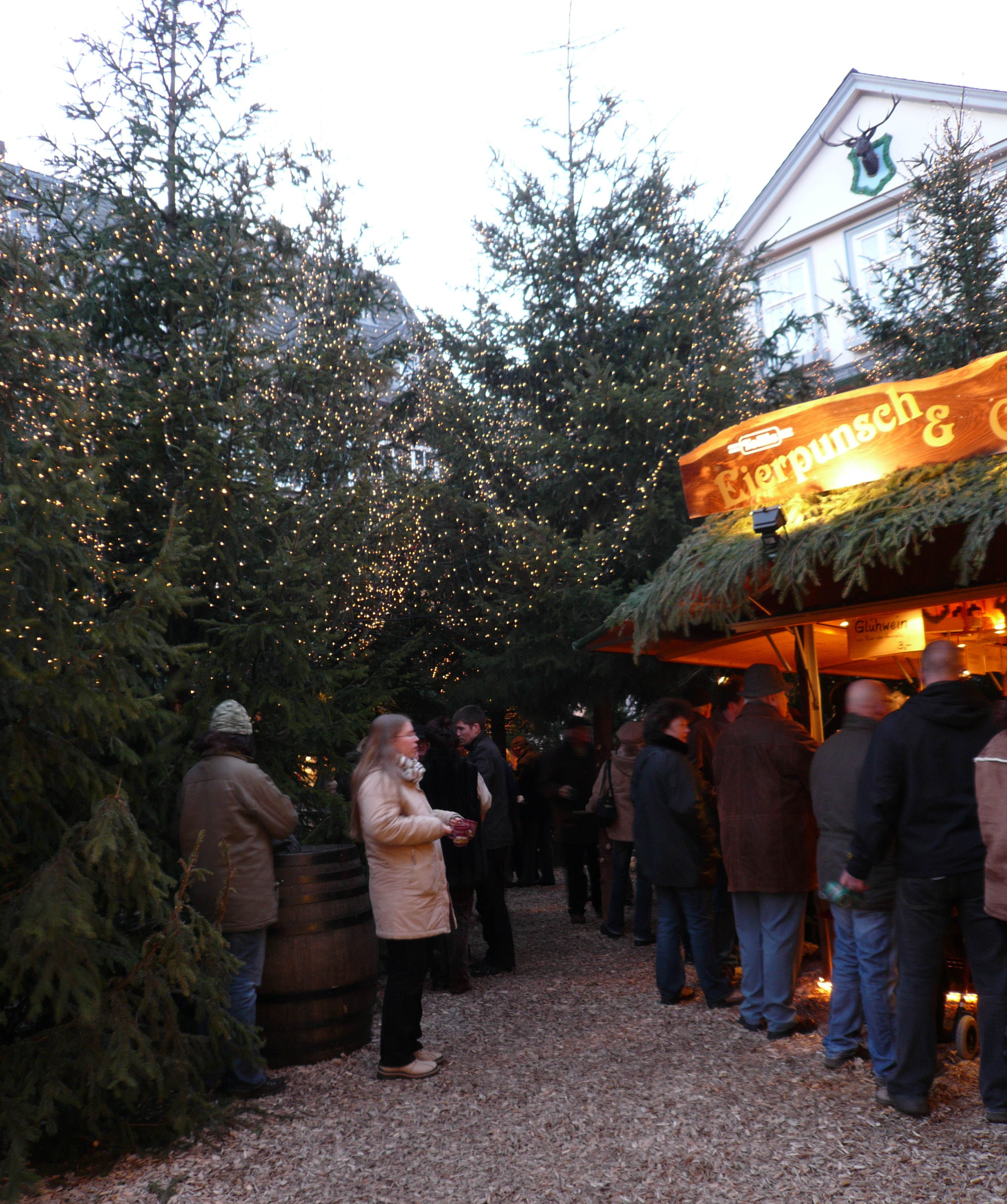 Christmas market at Goslar